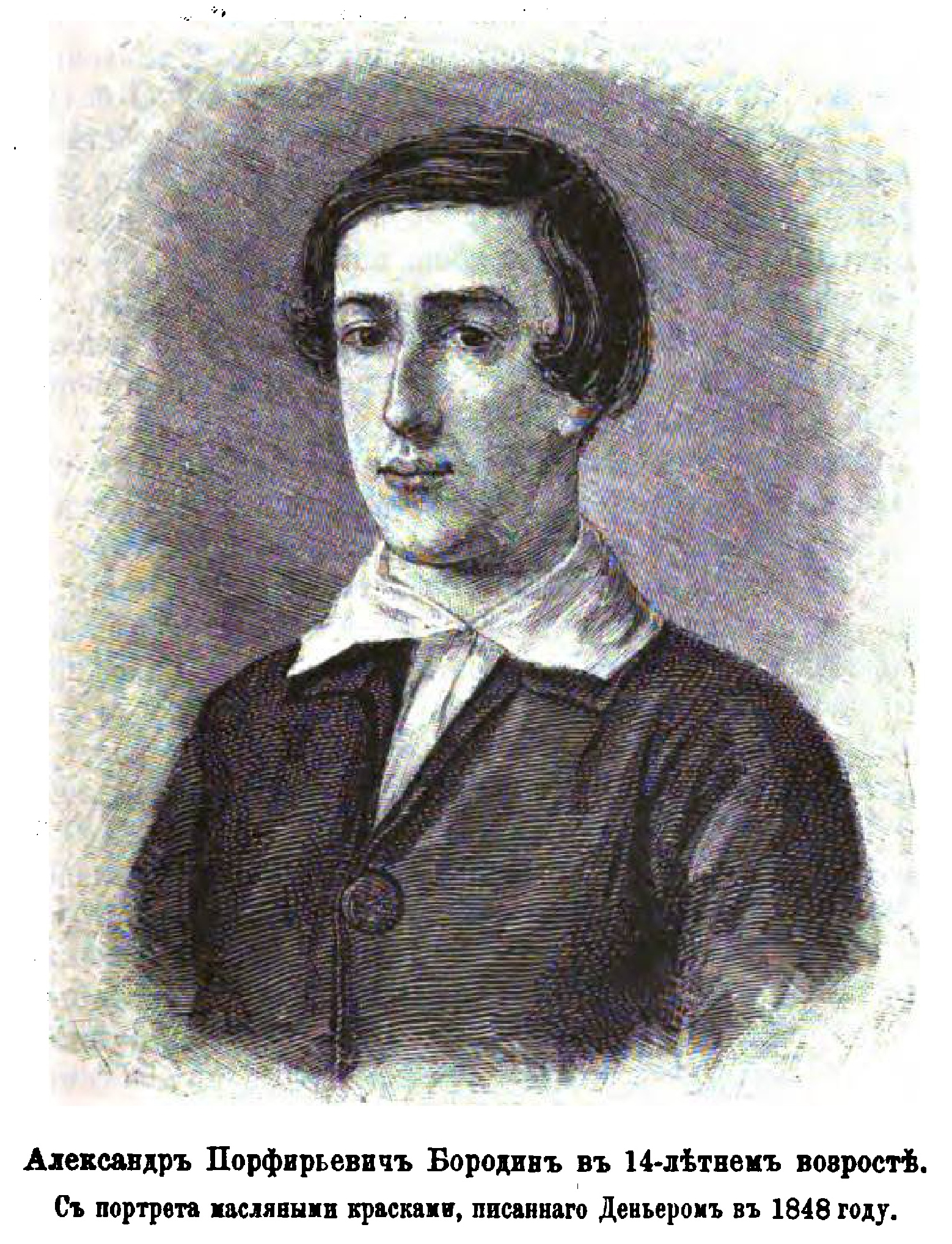 Бородин Александр Порфирьевич в 14-ти летнем возрасте. С портрета, написанного Деньером в 1848 г.